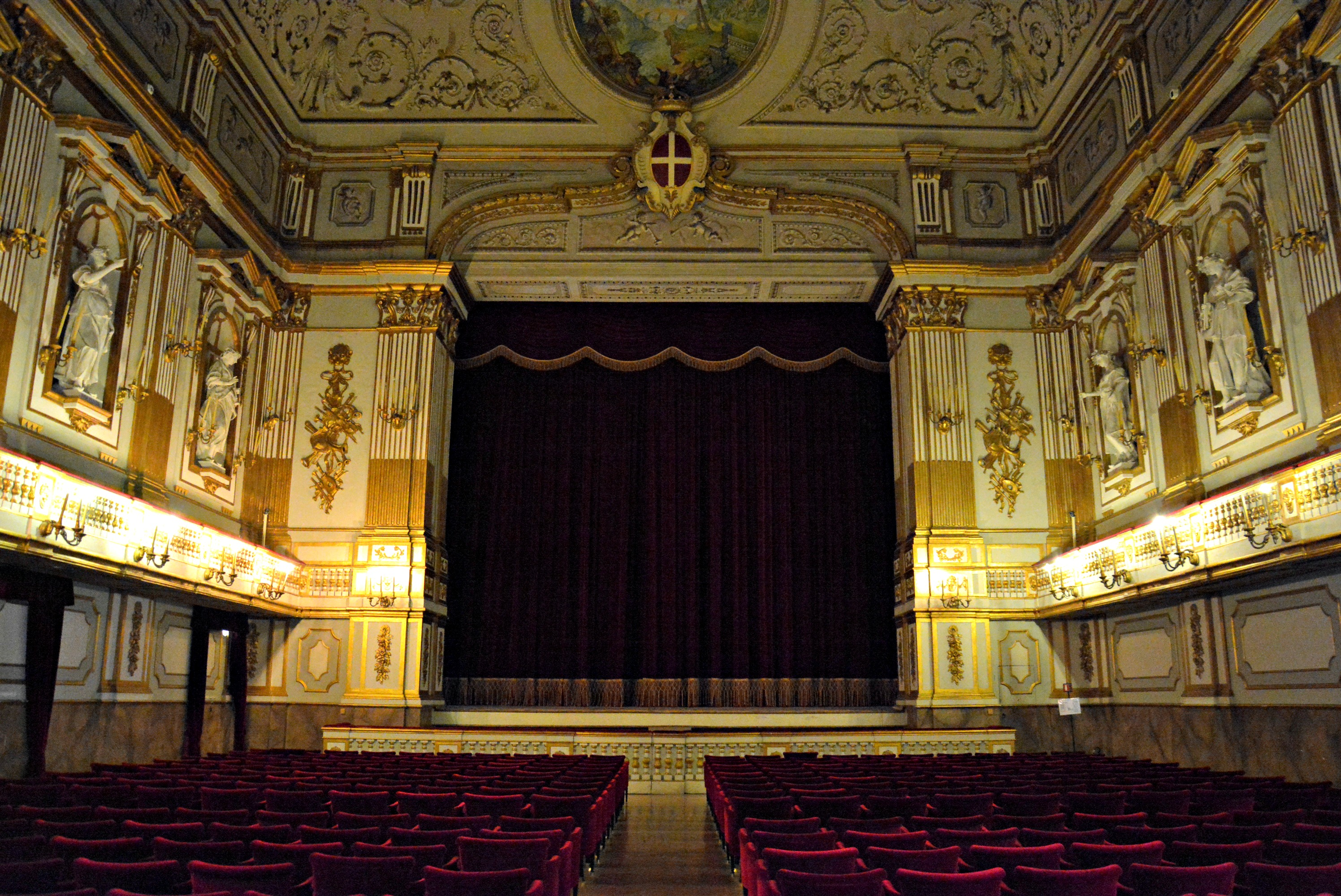 Vedi titolo